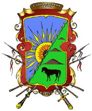 Герб Солонянського району (стара версія)